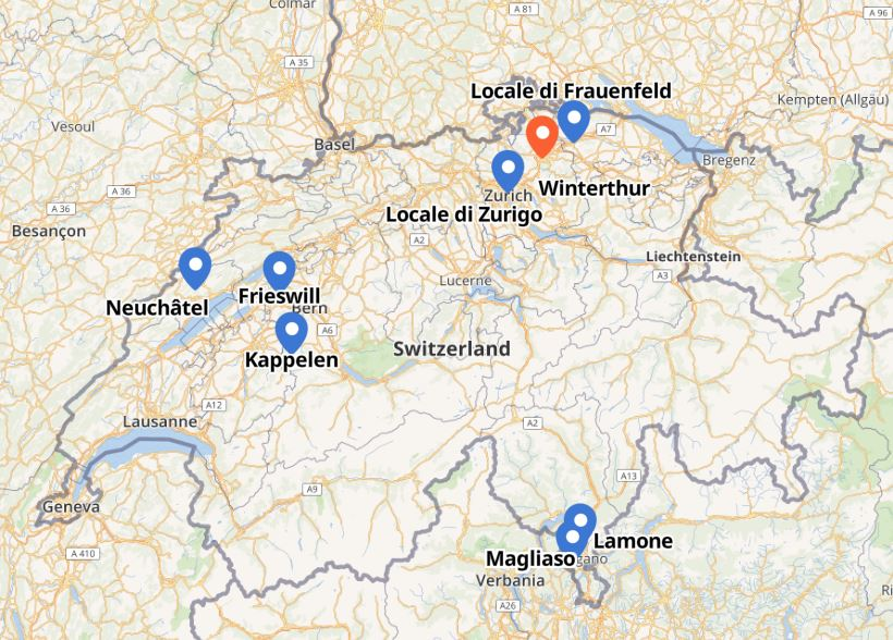 'ndrangheta in Svizzera, locali e 'ndrine 2019